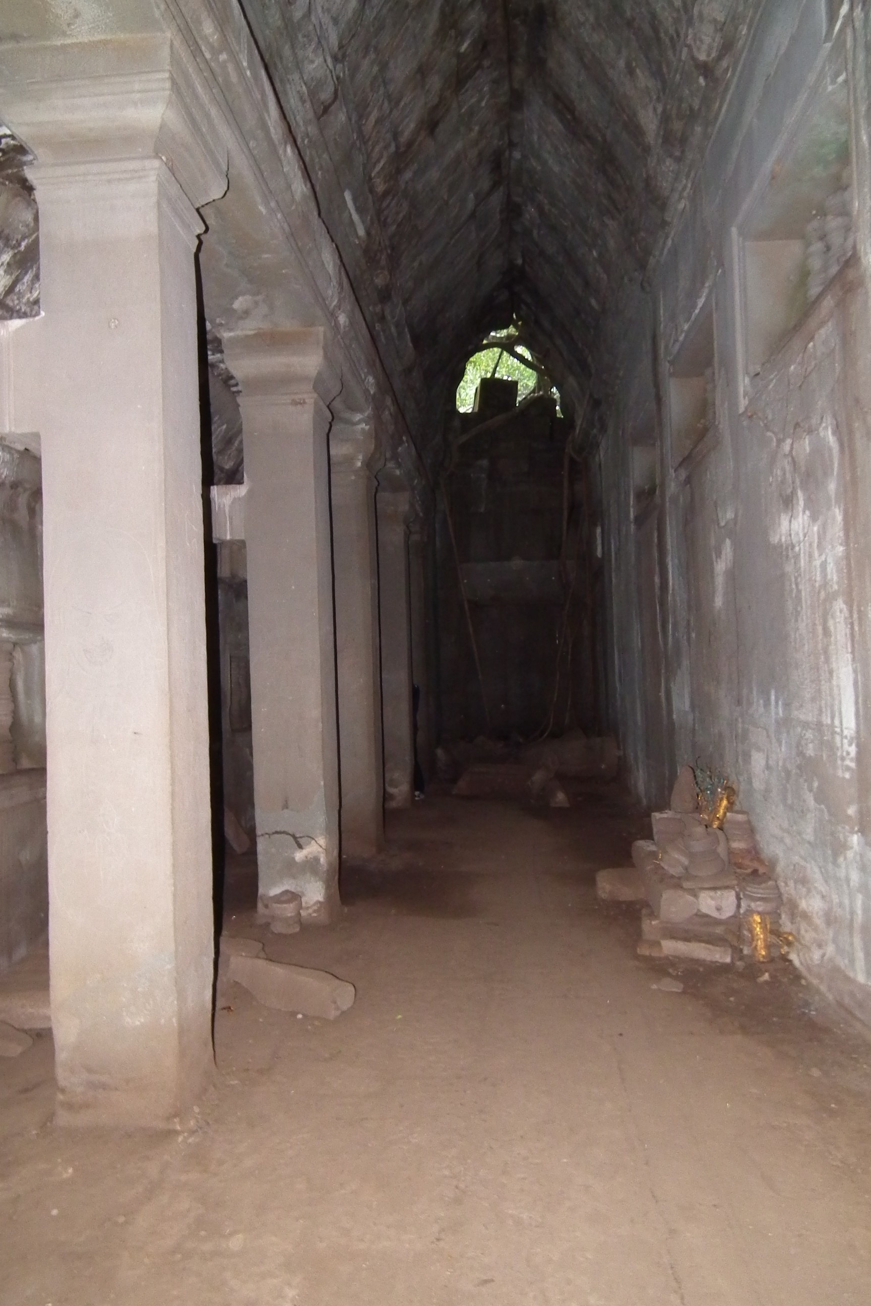 Beng Mealea-Restaurant ប្រាសាទបឹងមាលា ベンメリア